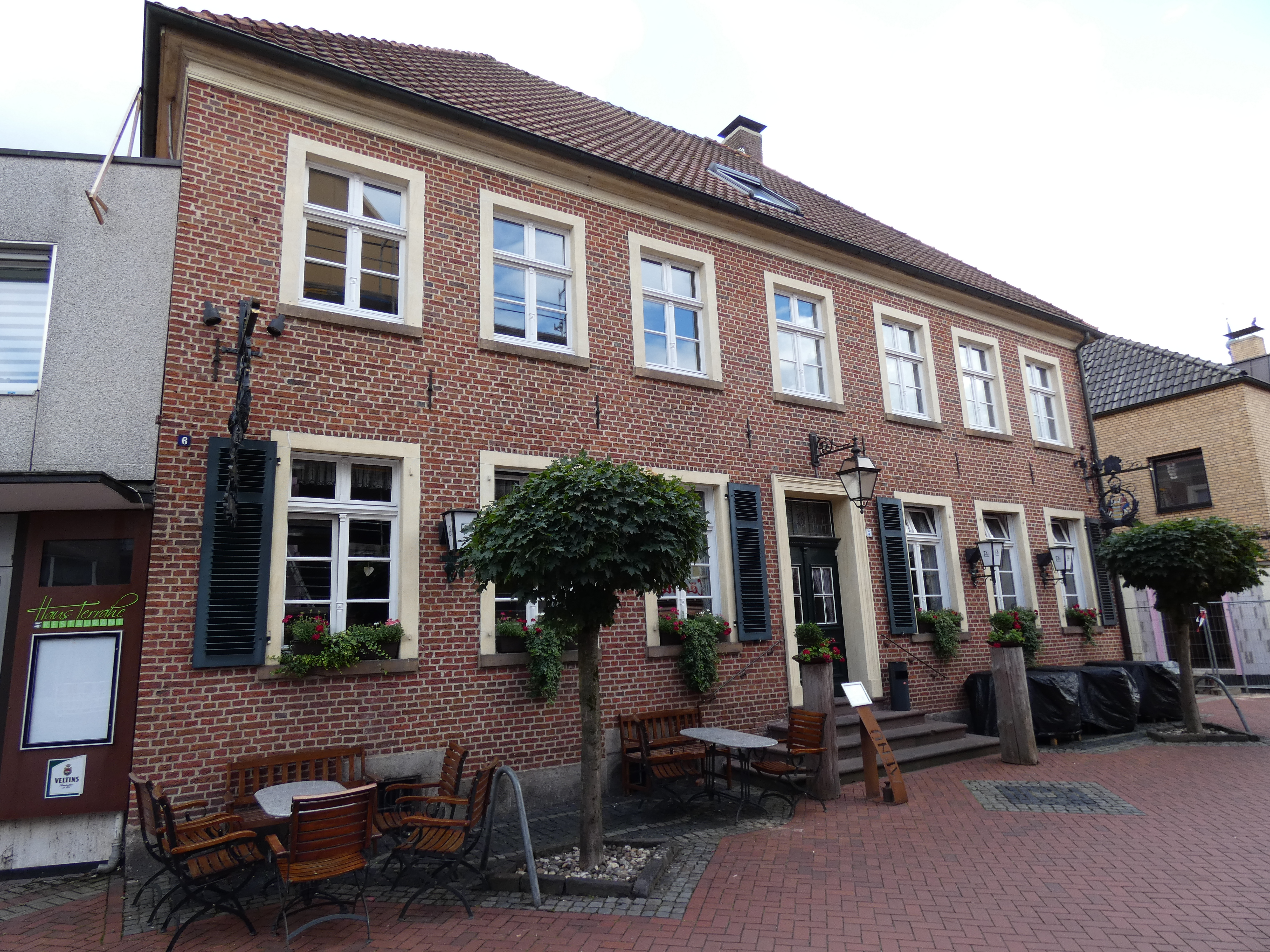 Gaststätte Terrahe Vreden in der Königsstrasse 6